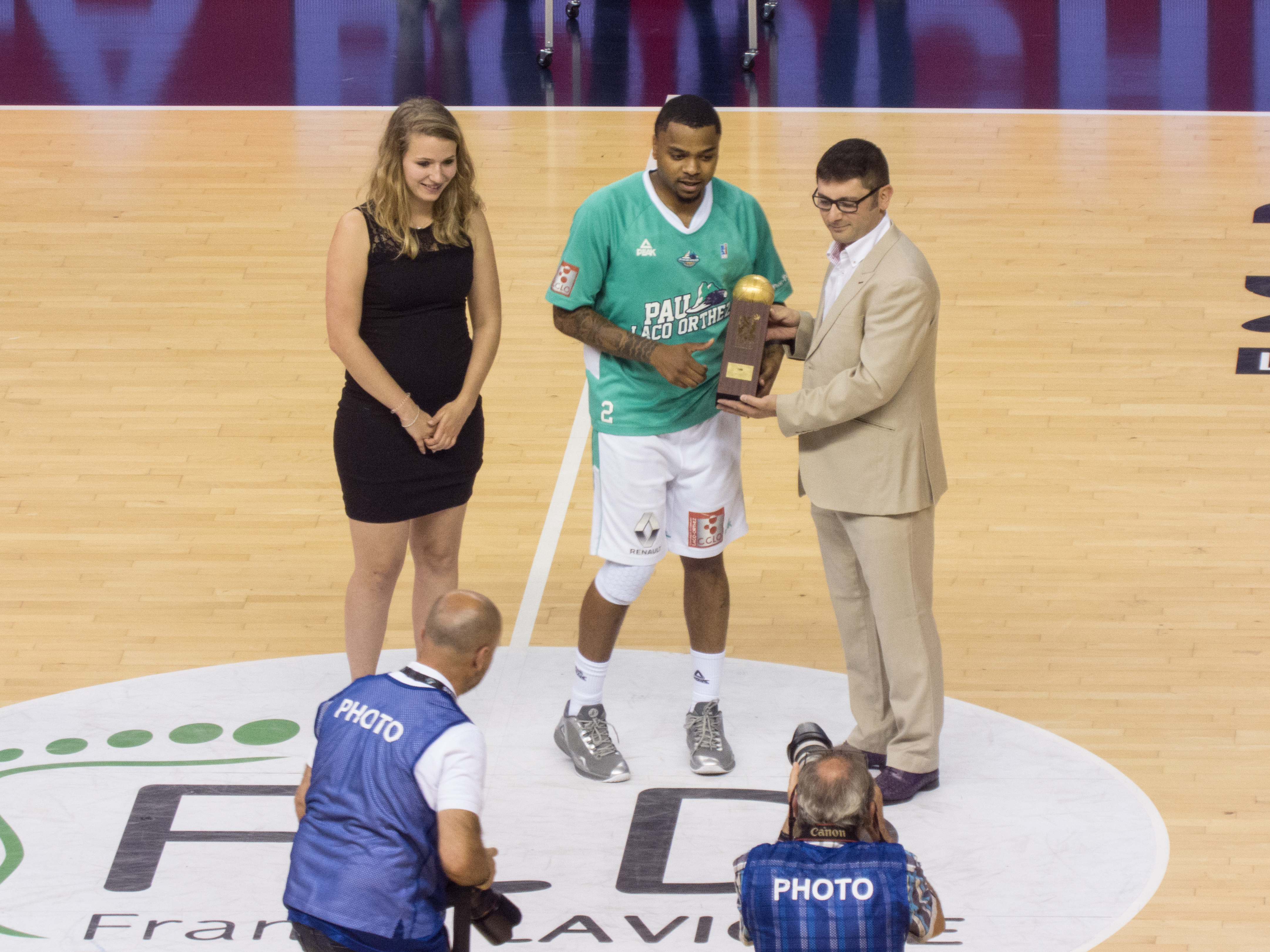 2016–17 Pro A season — 24 May 2017, Palais des Sports de Pau. Match between: Élan Béarnais Pau-Lacq-Orthez — Strasbourg Illkirch-Graffenstaden Basket